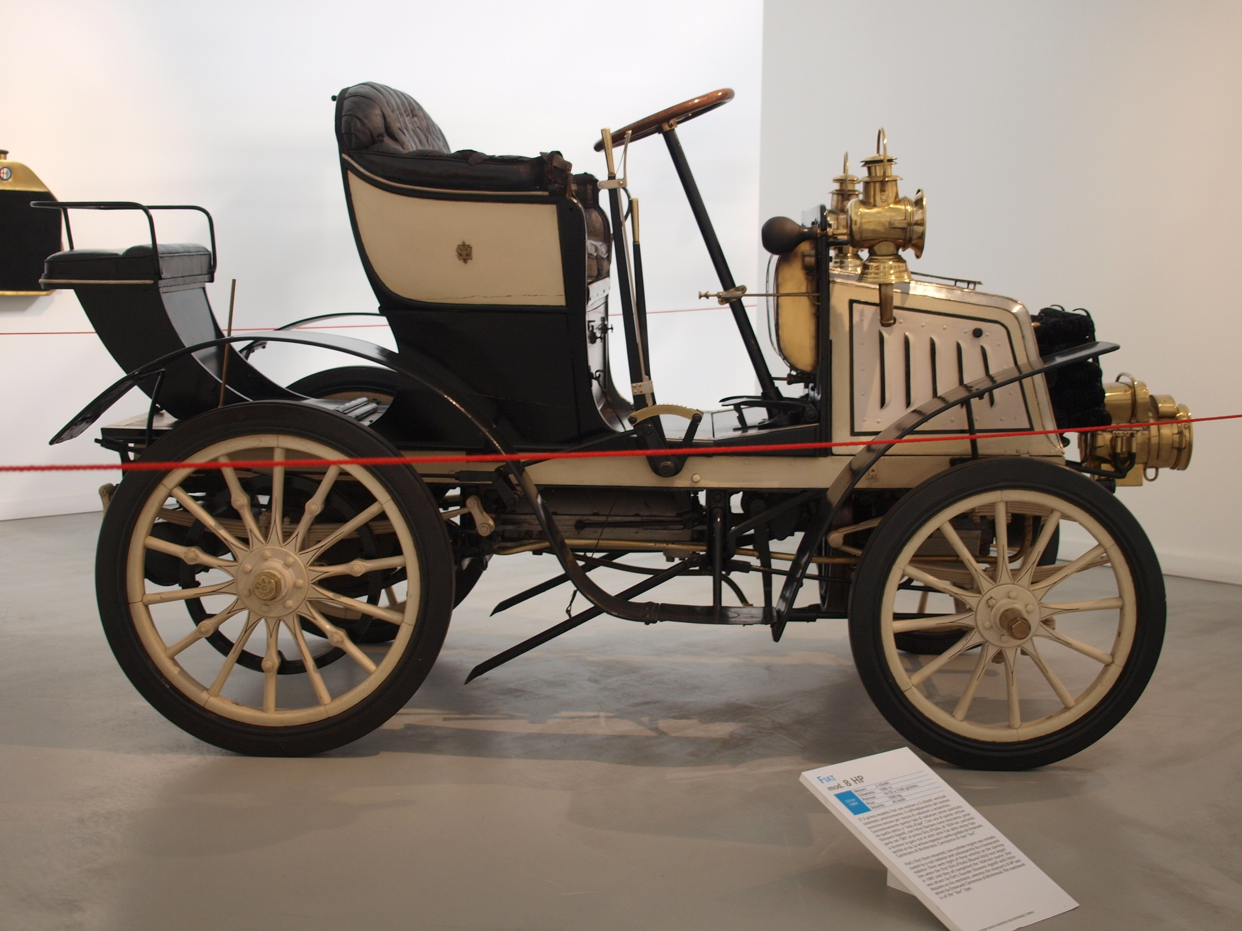 Fiat 8 HP - Italy 1901 L'Evoluzione dell'automobile .